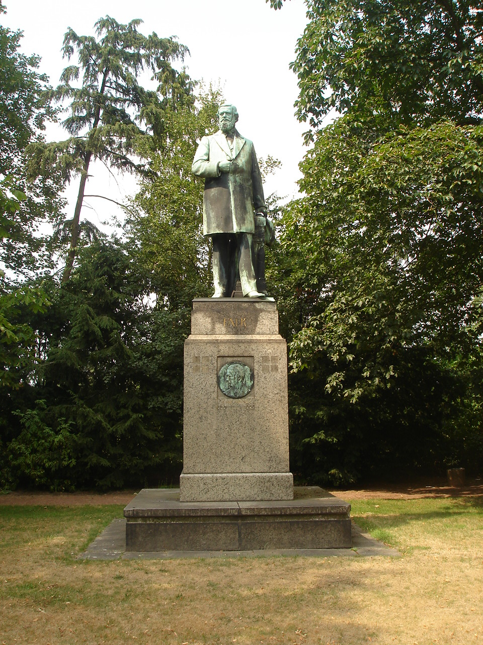 Denkmal für Adalbert Falk, Standbild von Bildhauer Wilhelm Wandschneider, vor dem Eingang zum Ostenfriedhof in Hamm, eingeweiht 10. Juni 1905